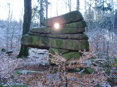 Kuckuckstein, Königshain, Sachsen